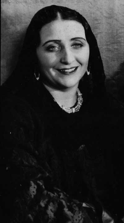 Karin Juel